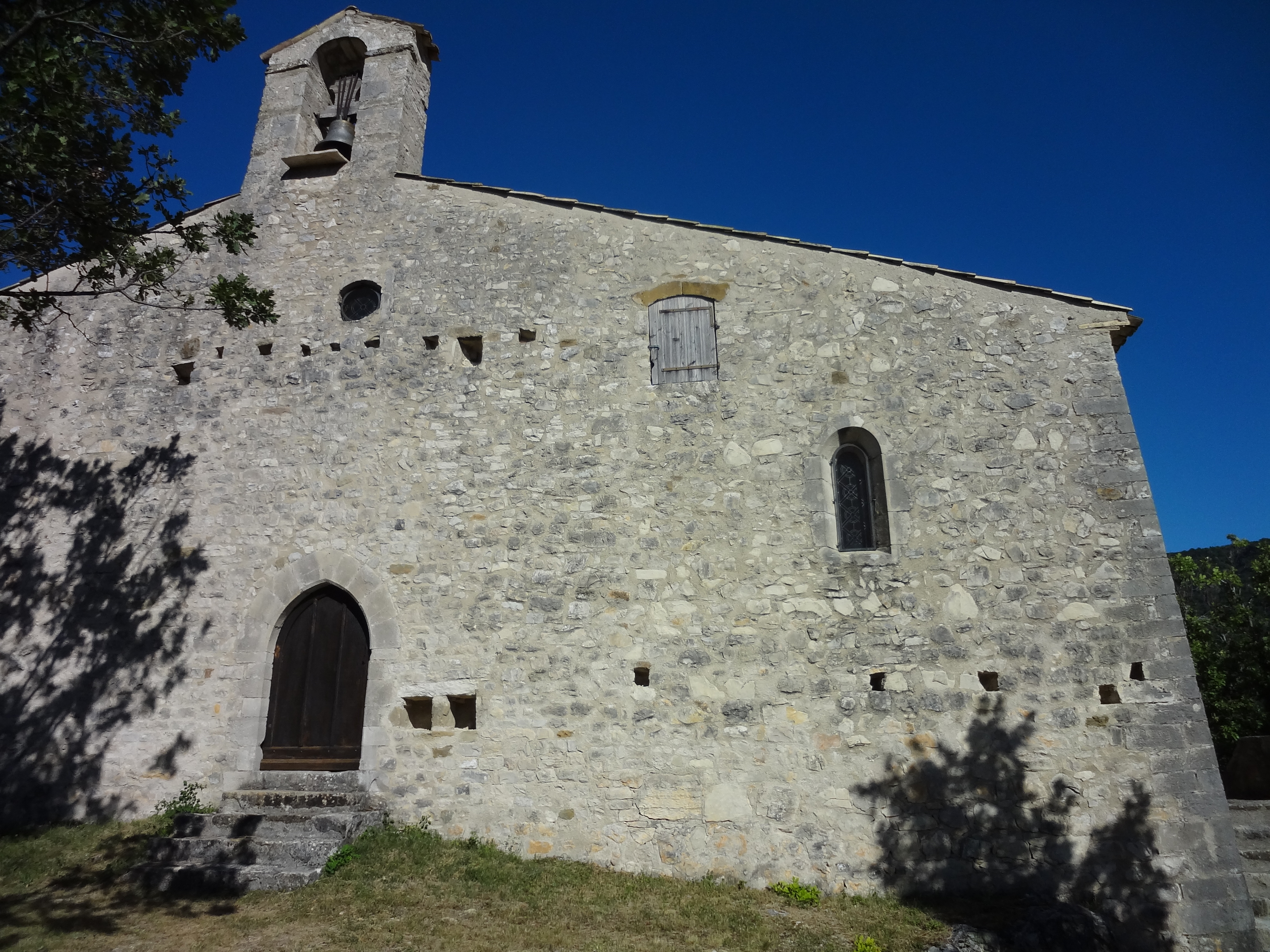 Façade de la chapelle Saint-Mary (Marius) de Châteauneuf-Miravail